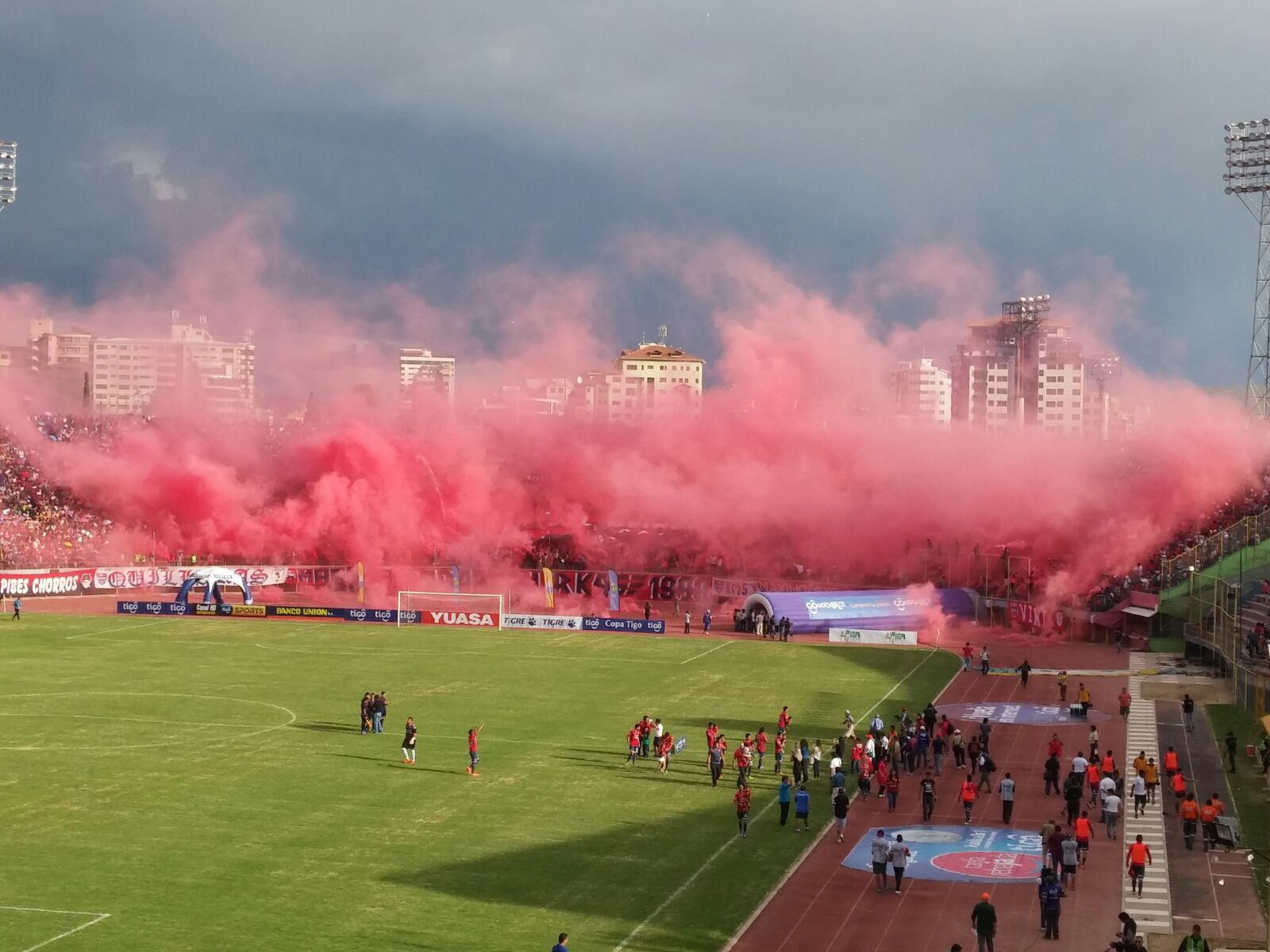 Recibimiento al Aviador